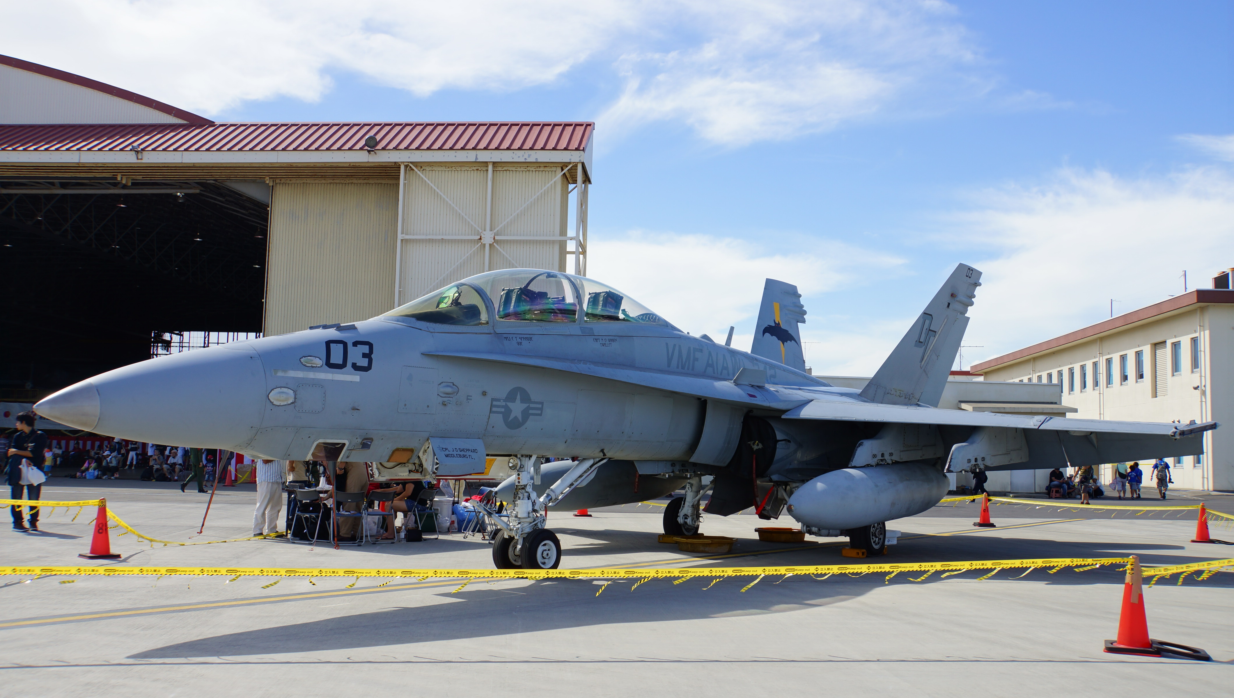 米海兵隊 F/A-18Dホーネット戦闘攻撃機（165531号機）。 14年9月14日 岩国航空基地にて。